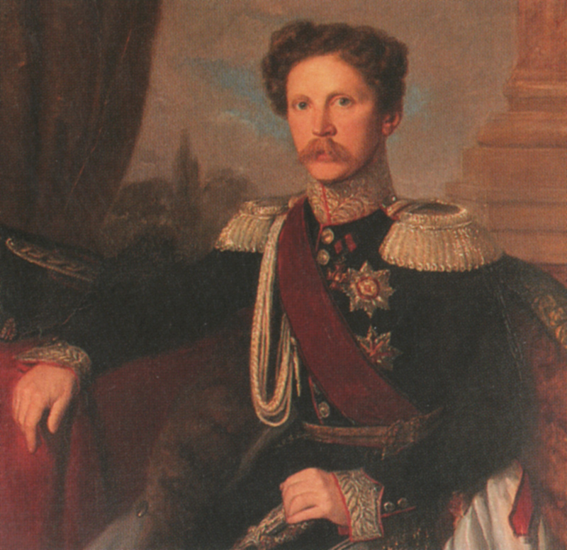 Alfred von Neipperg (1807-65). Alfred war der älteste Sohn des Grafen Adam Albert von Neipperg (1775–1829) aus dessen erster Ehe mit Gräfin Theresia Pola de Treviso (1778–1815). Nach dem Tode seines Vaters stand er an der Spitze des Hauses Neipperg